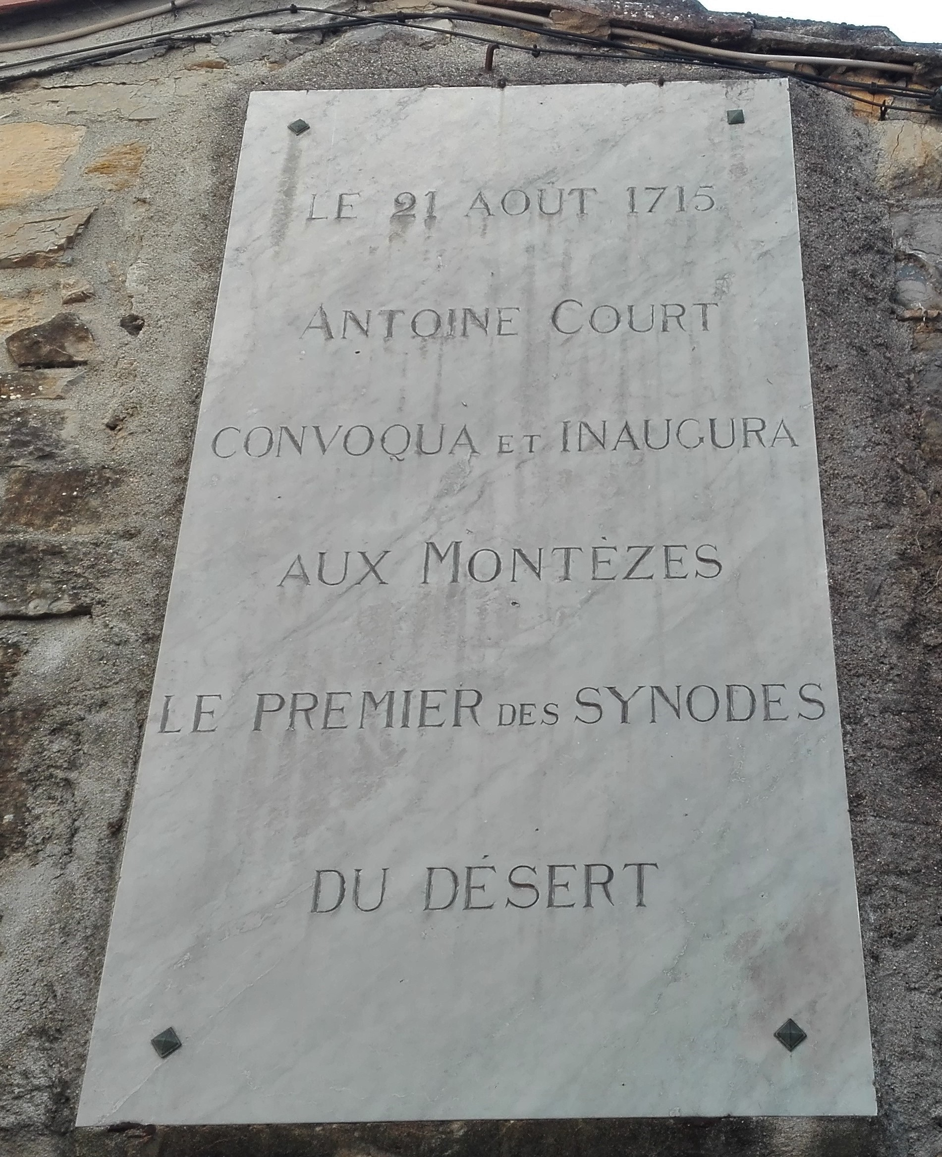 Cette plaque est située dans le hameau des Montèzes, rattaché à la commune gardoise de Monoblet. Elle commémore le premier synode du Désert, organisé en 1715 dans ce lieu par Antoine Court.